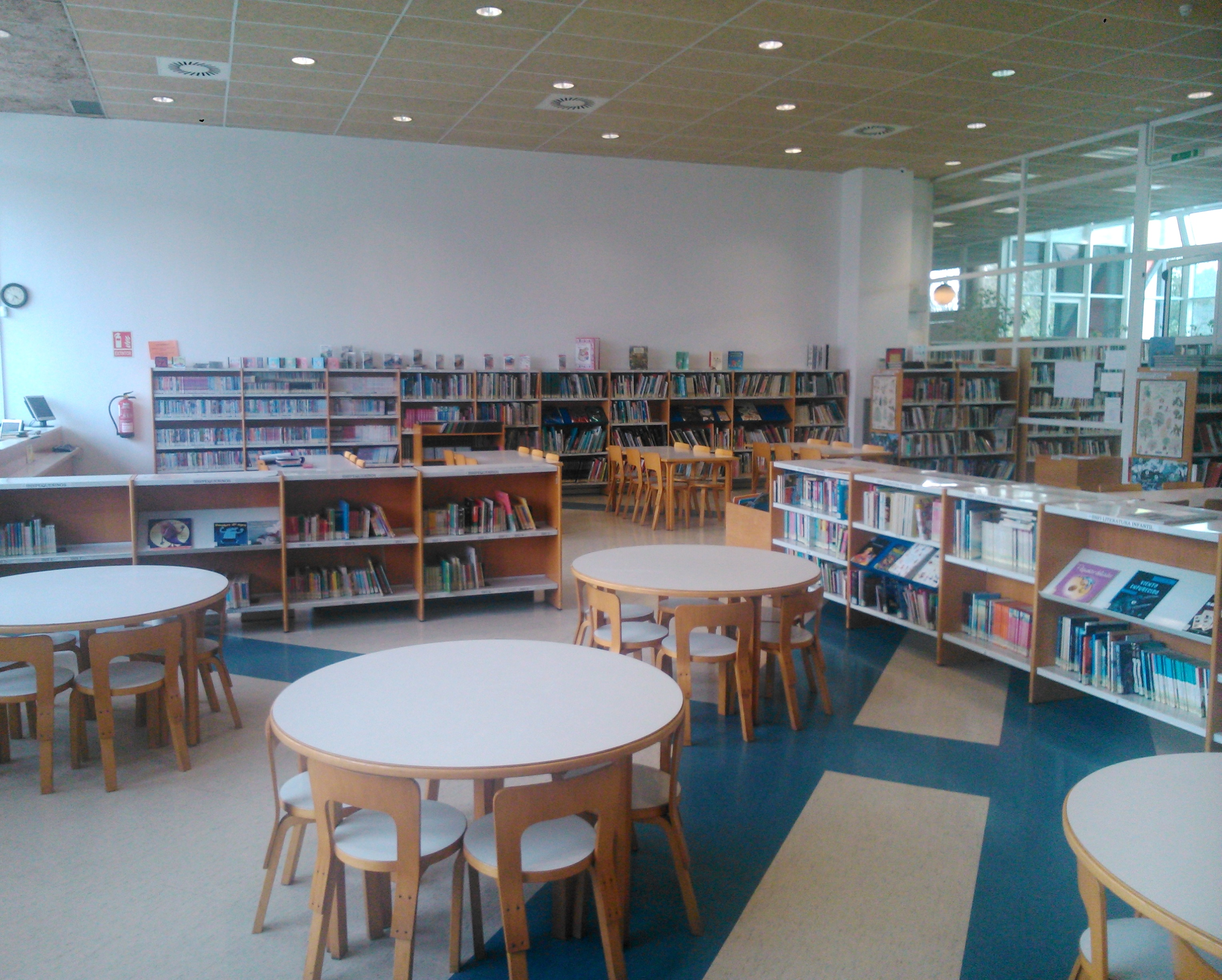 Sala Infatil de la Biblioteca Pública Bances Candamo de Avilés.